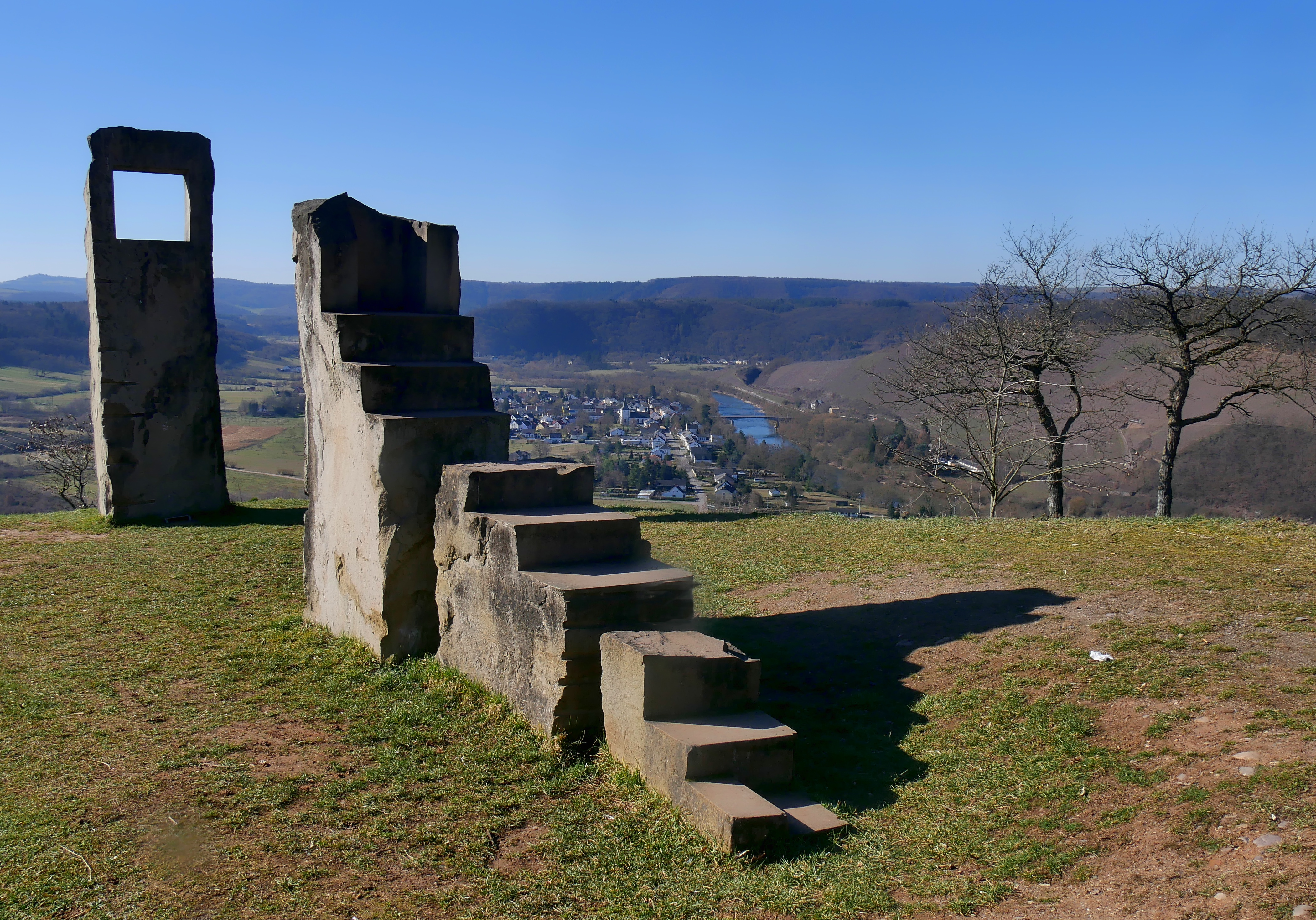 "Passagio Animato" von Maria Claudia Farina; Lage: auf dem Galgenberg über Wiltingen an der Saar. Im Hintergrund sind Bahn, Kirche und Häuser von Kanzem zu sehen.